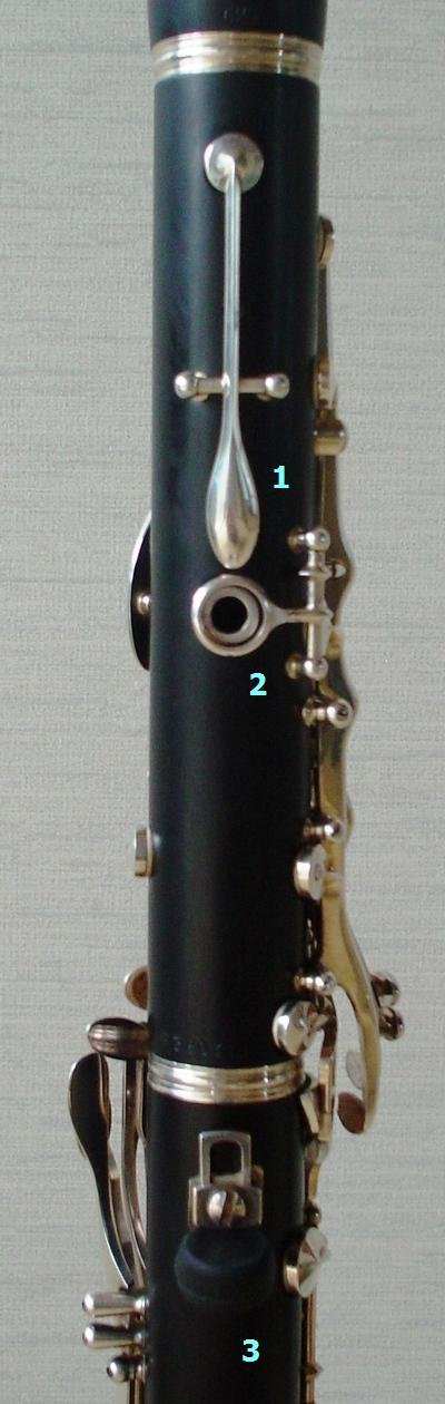 La clef de quintoiement (dite parfois clef de douzième) de la clarinette. Pouce de la main gauche. Détails d'une clarinette en si bémol.